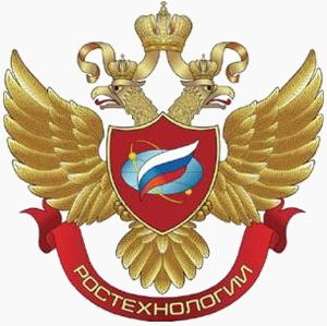 Эмблема Ростехнологии